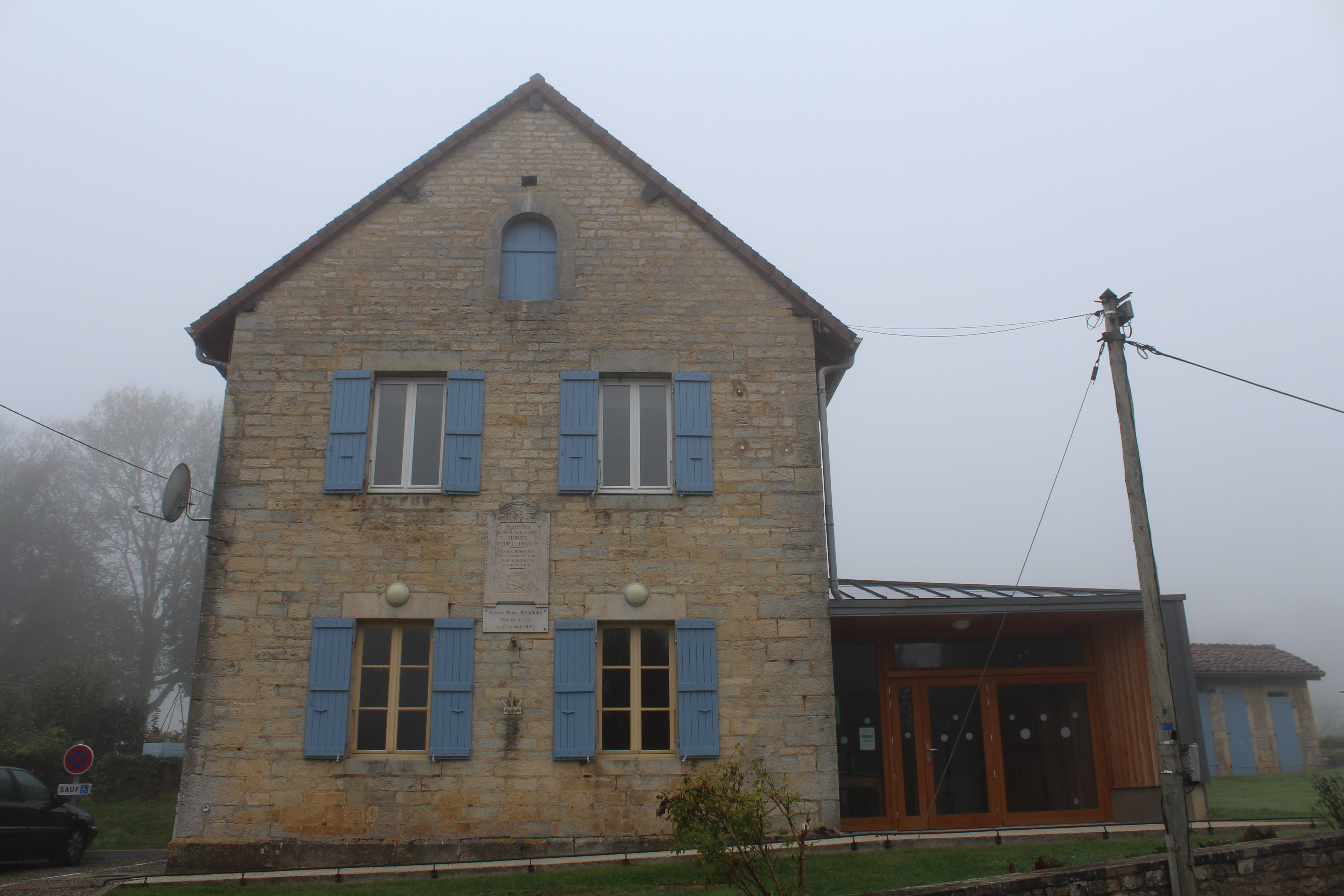 Mairie de Thoissia.